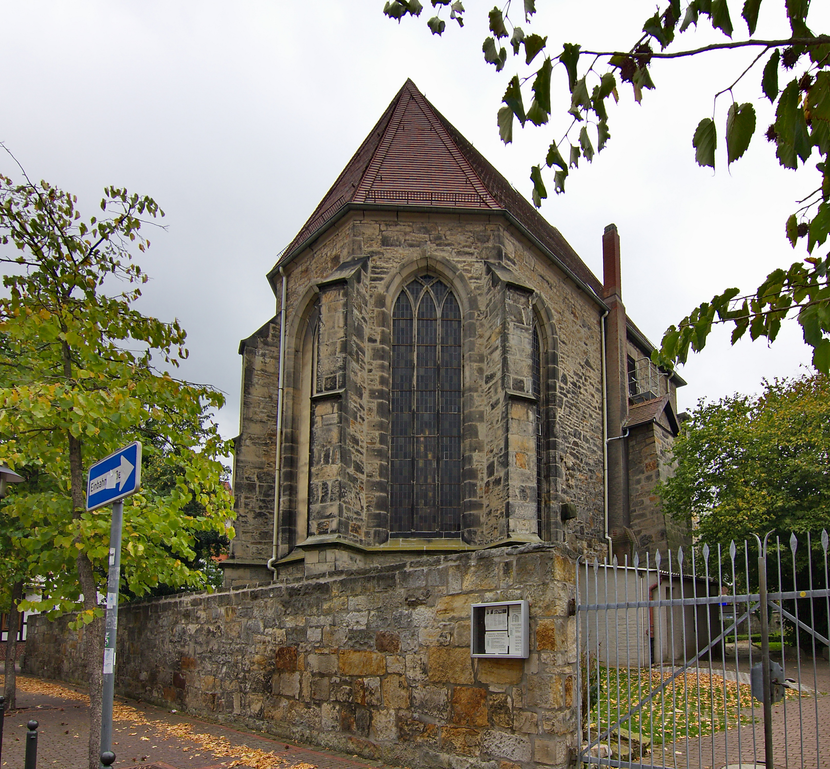 Die Klosterkirche (1485–1500) ist das Überbleibsel eines Franziskanerklosters in Stadthagen, Niedersachsen, Deutschland.